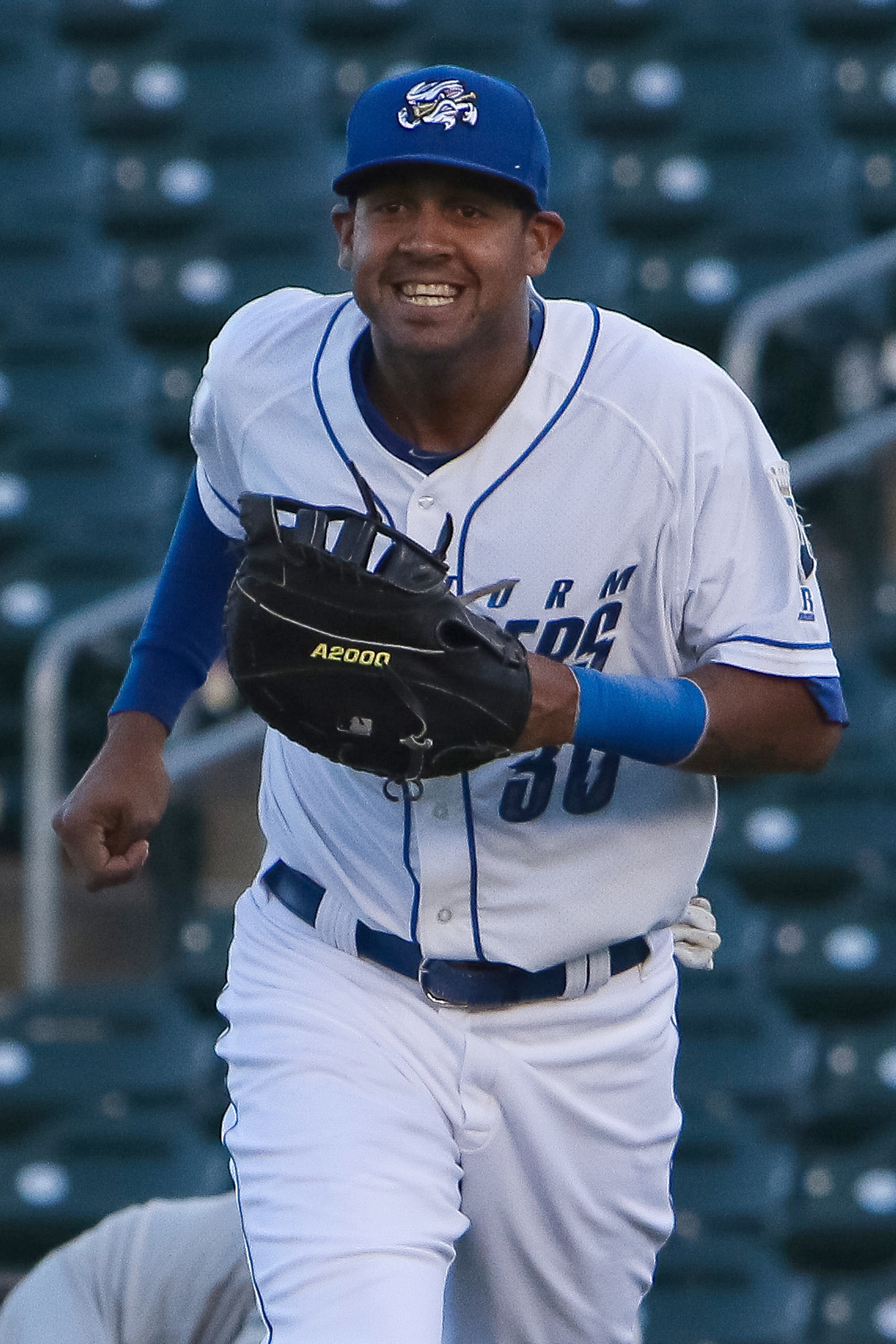 José Martínez